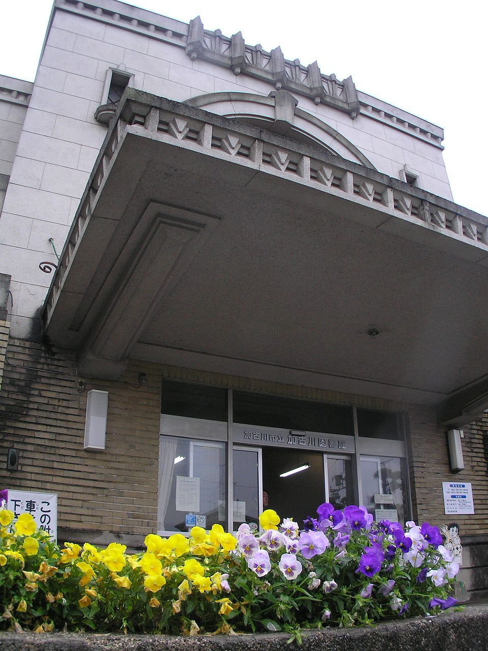 加古川図書館（加古川公会堂） 三島由紀夫が徴兵検査を受けた。